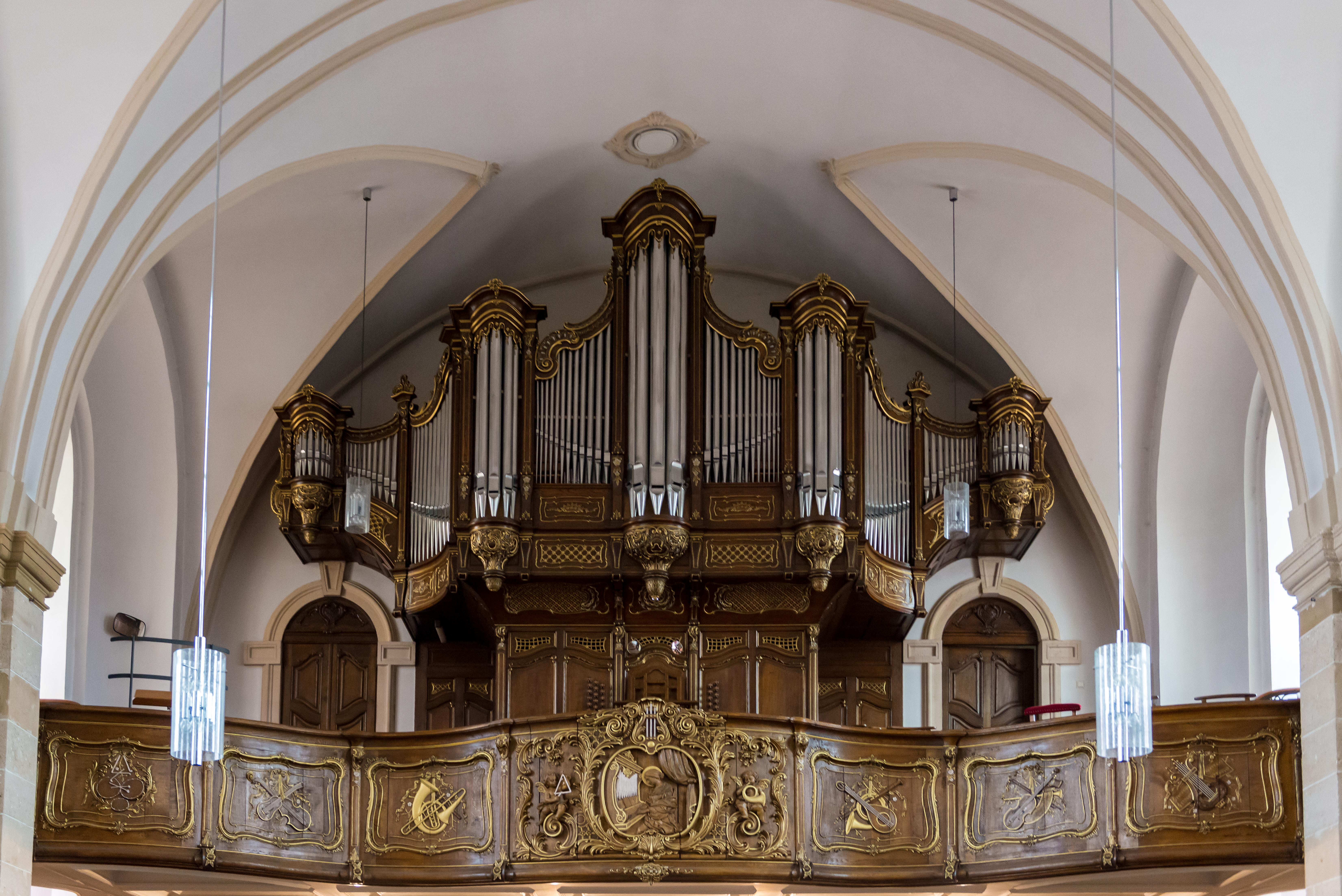 D'Uergel an der Munerefer Kierch. Wenn der Ungeschick nicht so geschickt gewesen wär Dann ständ jetzt diese Kirch nicht her